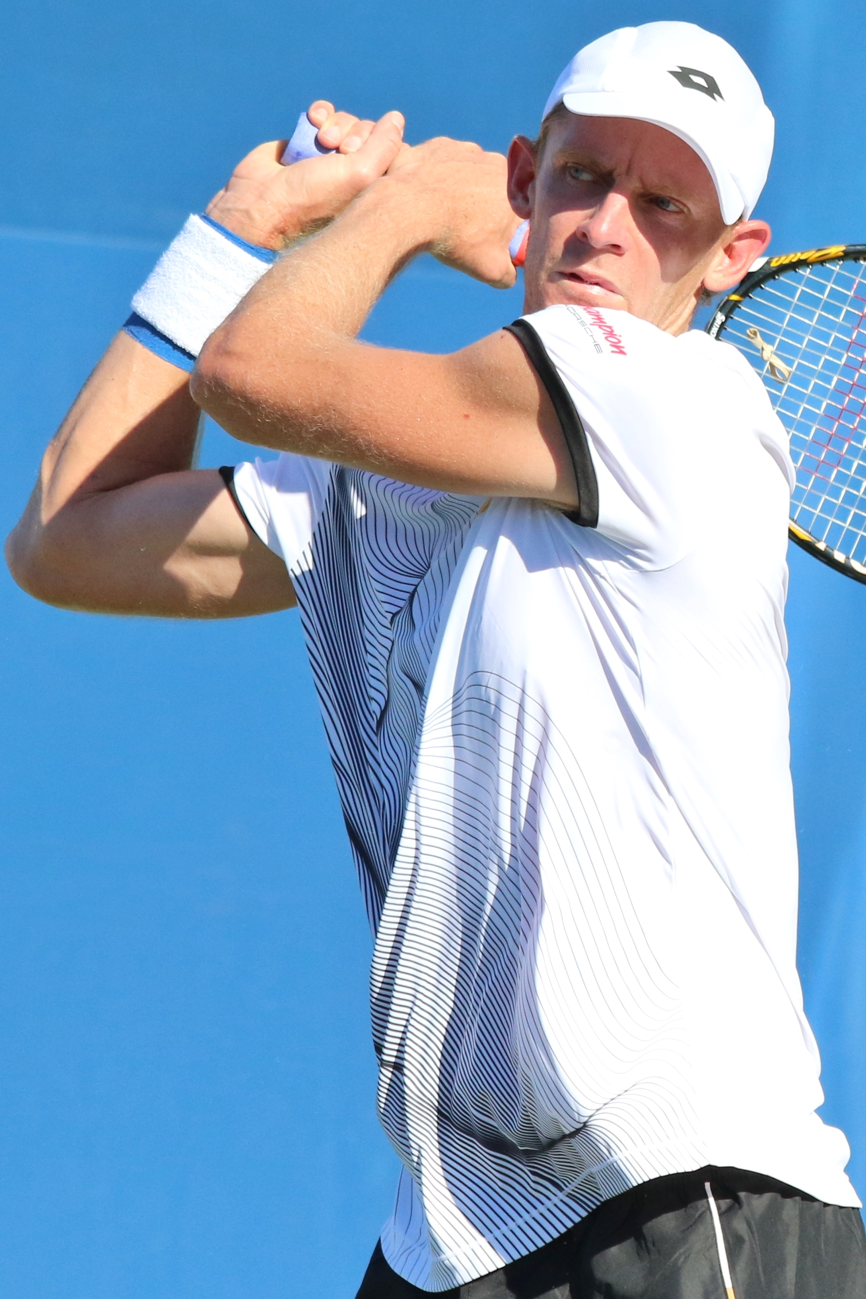 Anderson US16 (25)